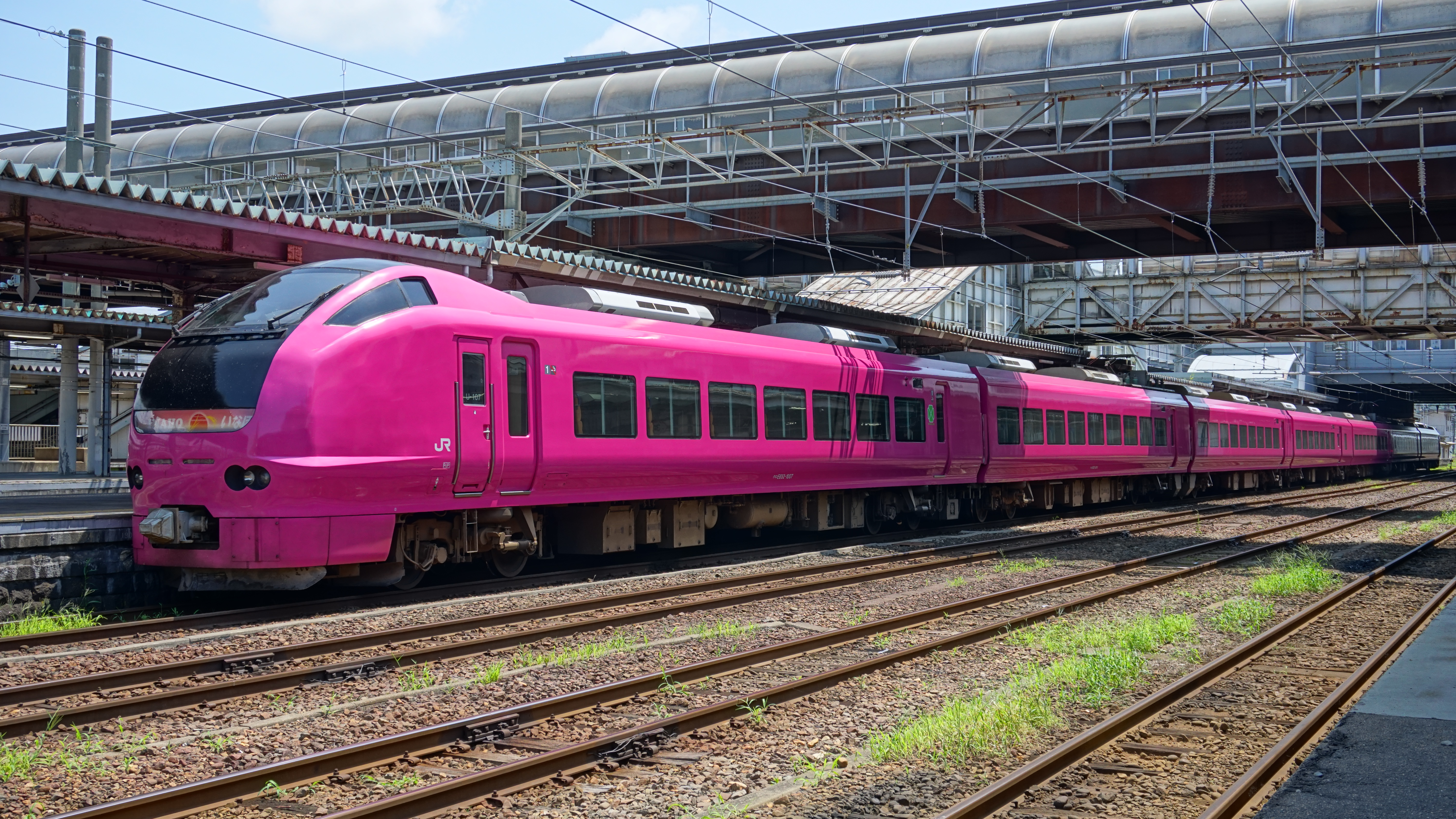 秋田駅に停車中の特急「いなほ」用E653系1000番代7連。このU107編成はハマナスの花をイメージしたワインレッドの塗装を纏っている。